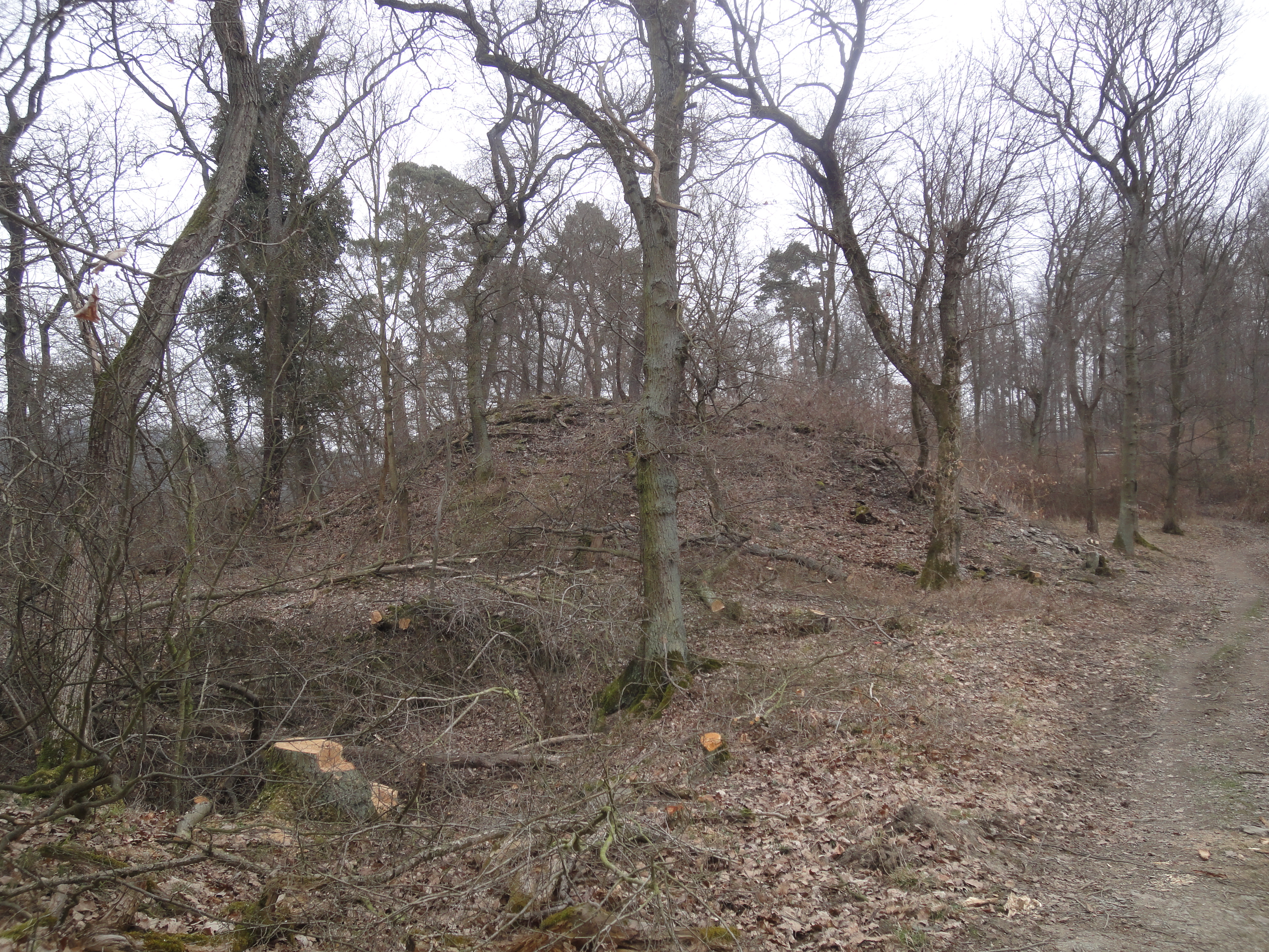 Der Burghügel der Burg Herzogenstein bei Dörscheid